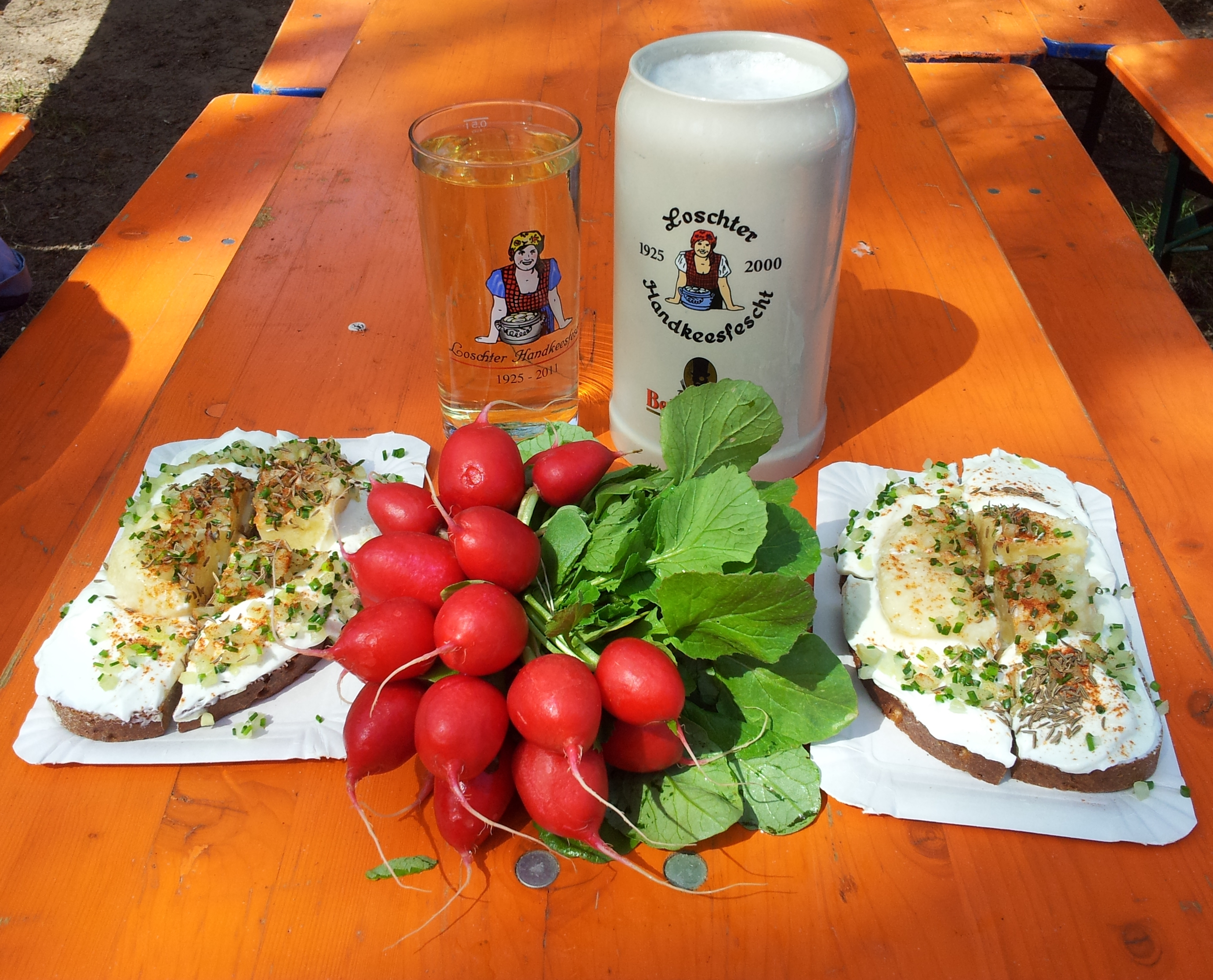 Handkeesbrote, Radieschen, ein Stein Bellheimer Bier und ein Schoppen Weinschorle auf dem Loschter Handkeesfescht als klassische Verpflegung